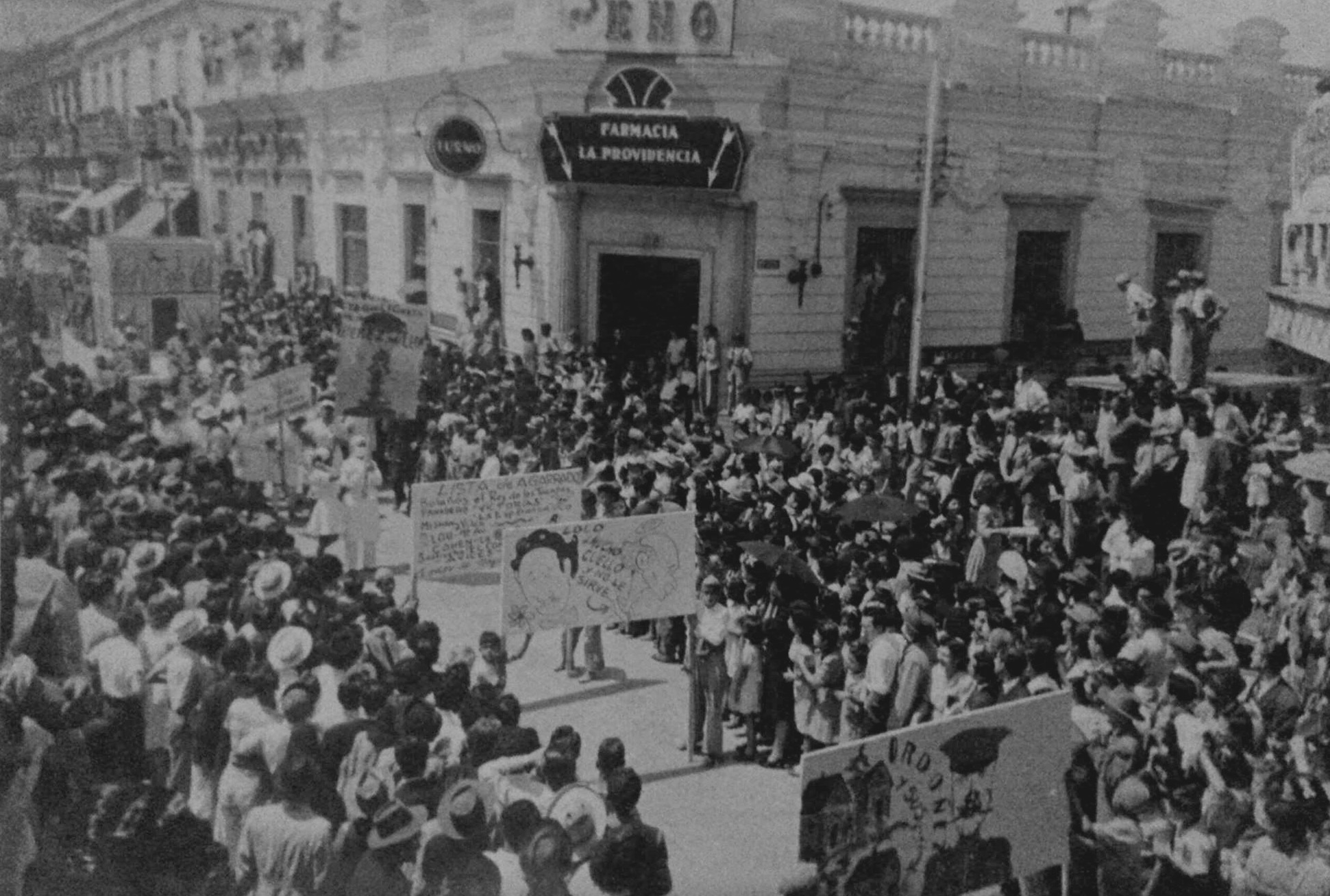 Desfile bufo de la Huelga de Dolores en 1930